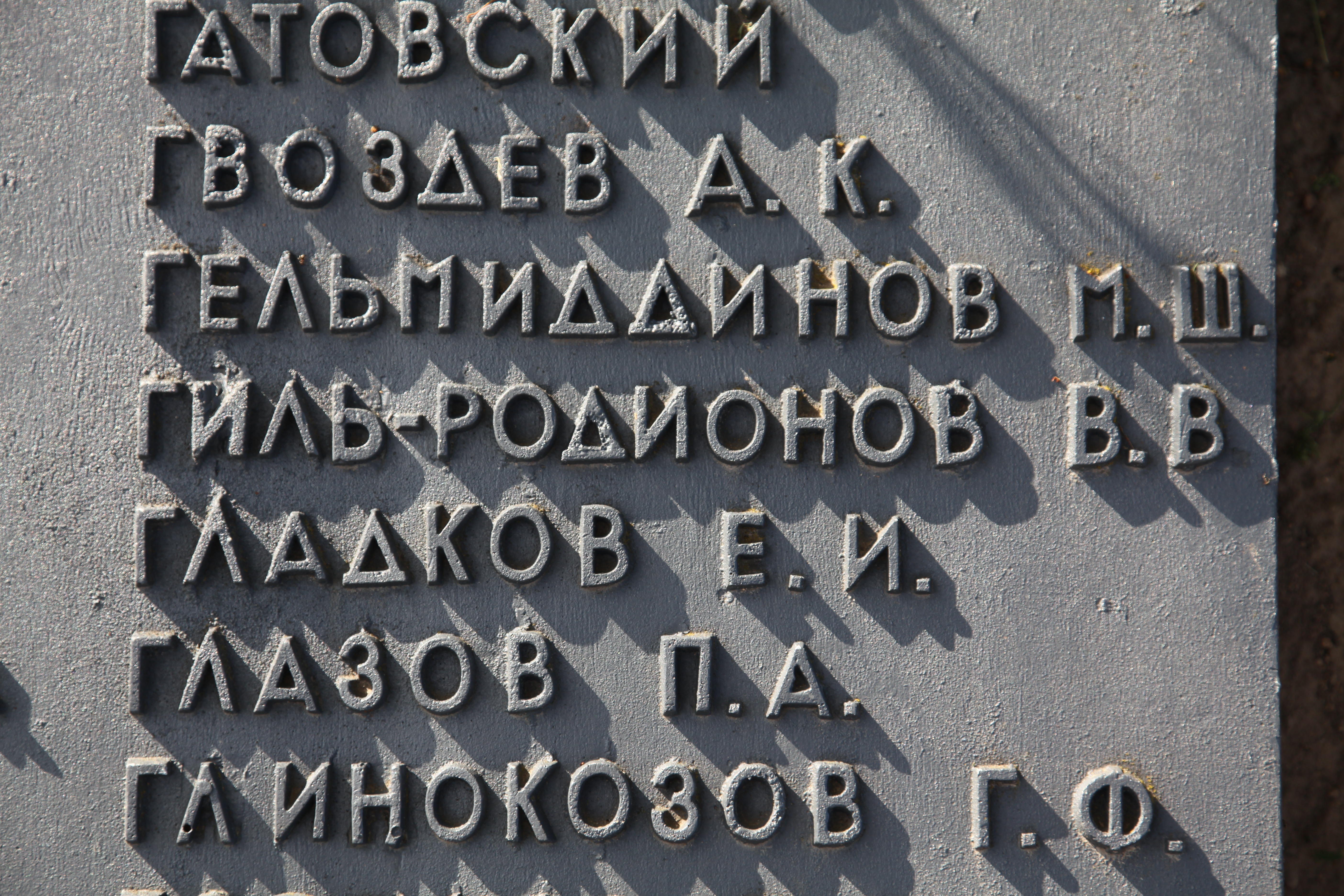 Мемориальная плита с именем В.В. Гиль-Родионова в мемориальном комплексе "Прорыв", Ушачи